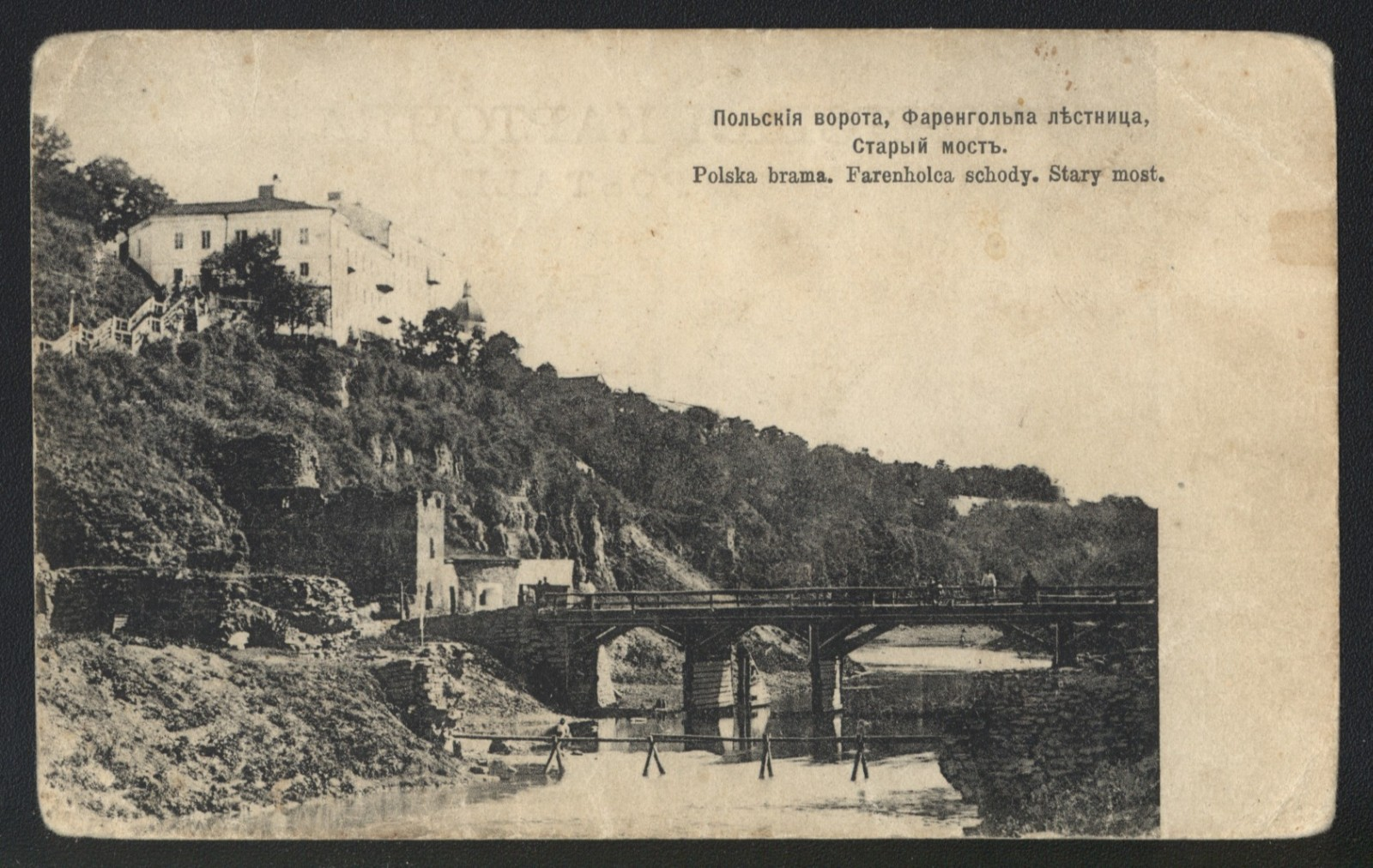 Польська Брама: Комплекс Польської брами. Вежі на р. Смотрич. Старий міст.